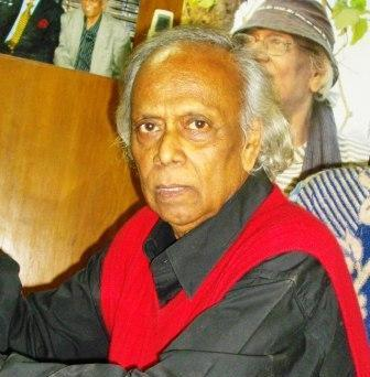 কবি ফজল শাহাবুদ্দিন ২০১০